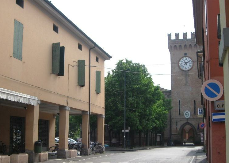 Castello sede del Comune di Poggio Renatico. Costruito nel medioevo è stato danneggiato nel terremoto in Emilia del 2012.